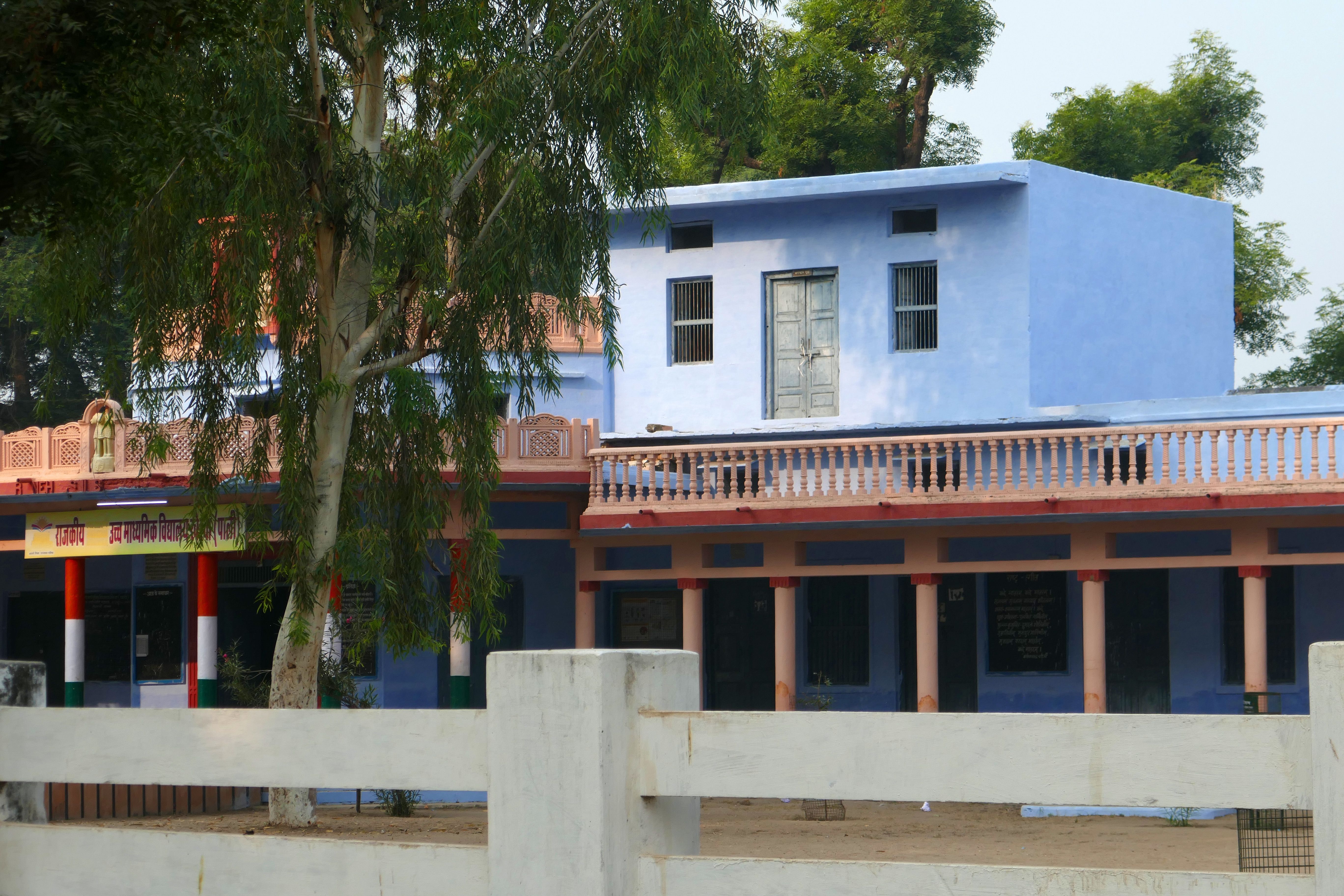 Ecole secondaire publique de Kherwa (Rajasthan) (Government Senior Secondary School, Khairwa)